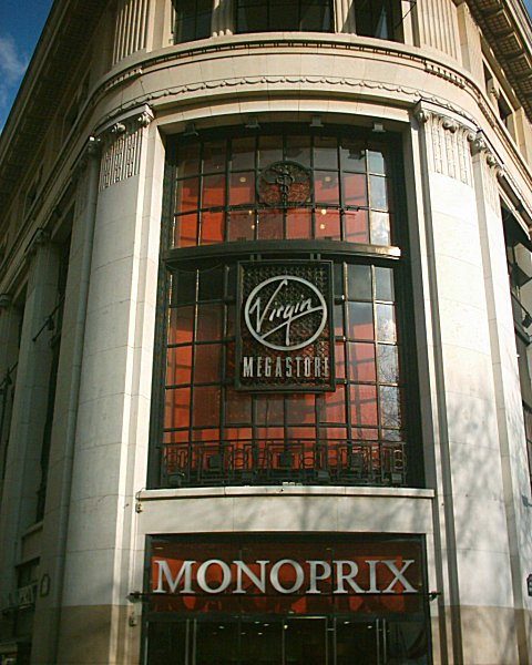 Virgin Megastore, La façade, Avenue des Champs-Élysées. Paris.